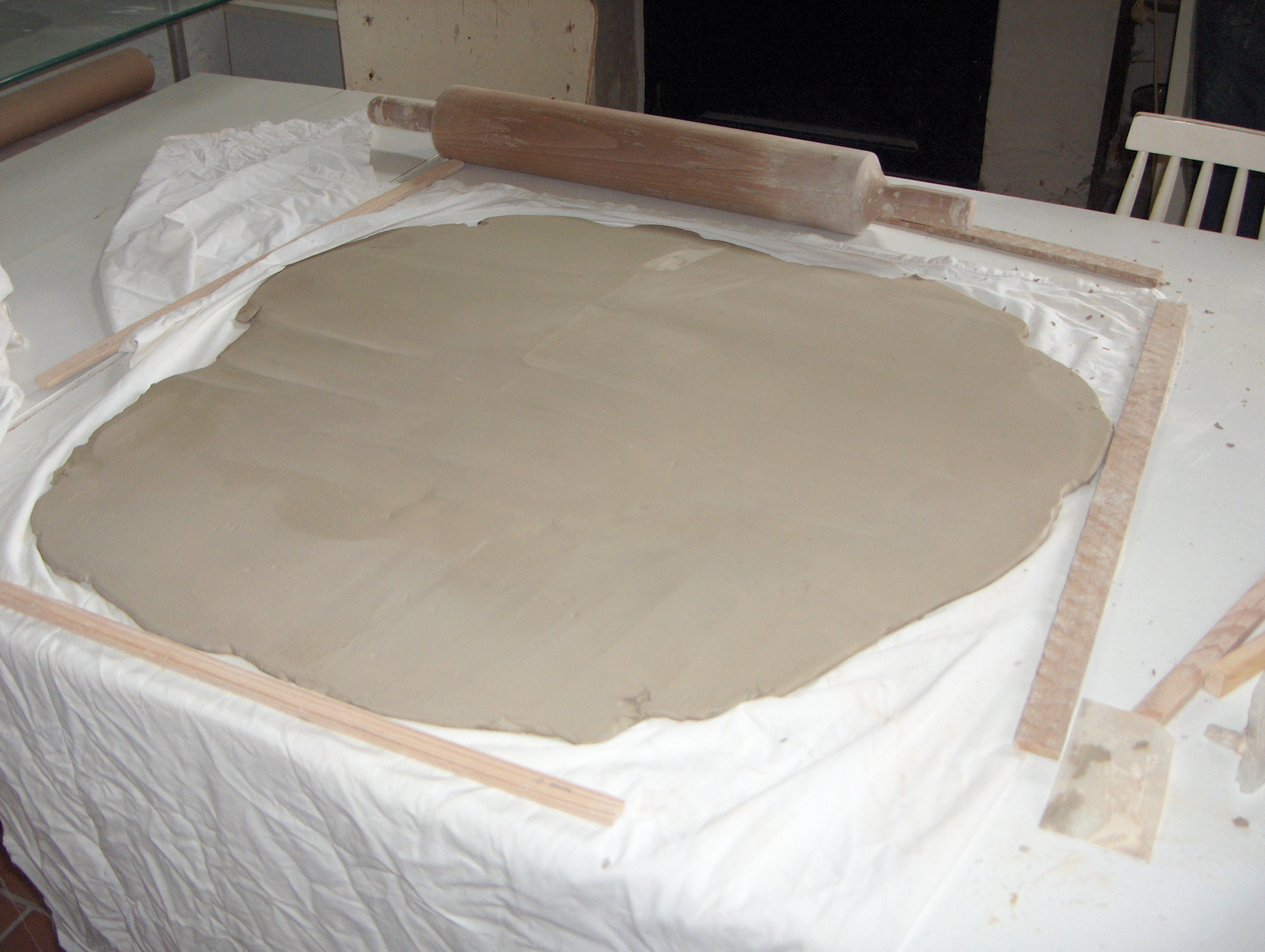 Een pak klei.